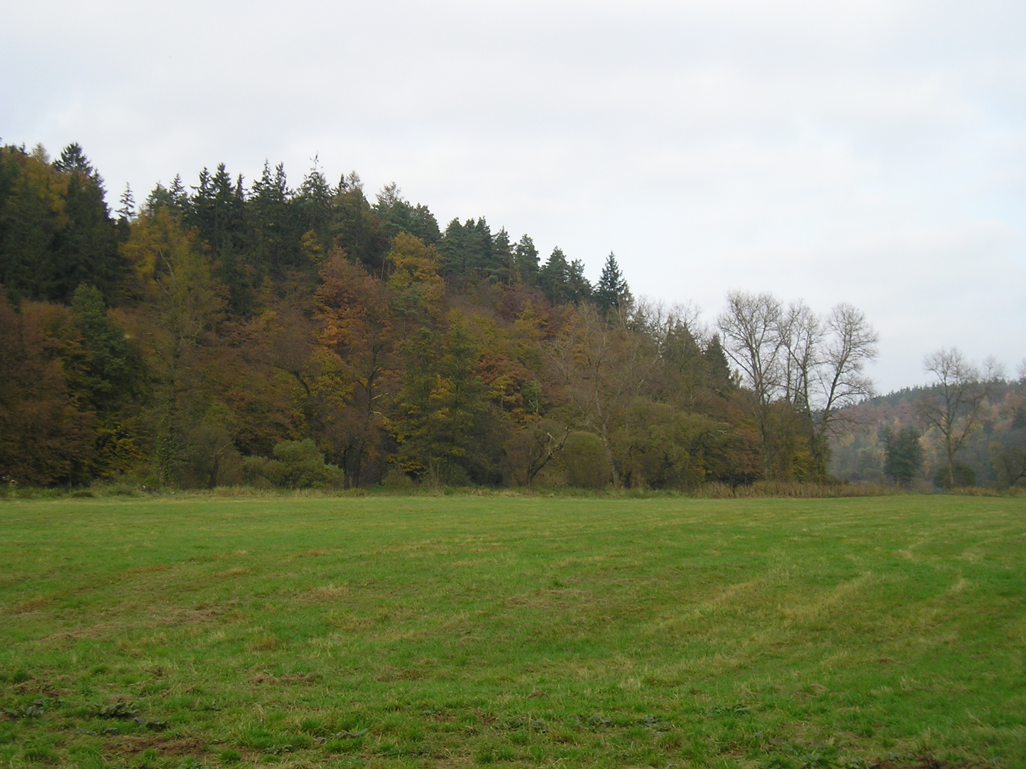 Pravý břeh řeky Berounky. Pravidelně sečená louka podél lesa v přírodní rezervaci Zábělé v významnými zástupci květeny. (Mezofilní ovsíková louka a bahnité říční náplavy.) Půdu lze definovat jako fluvizem a kambizem pseudoglejová.